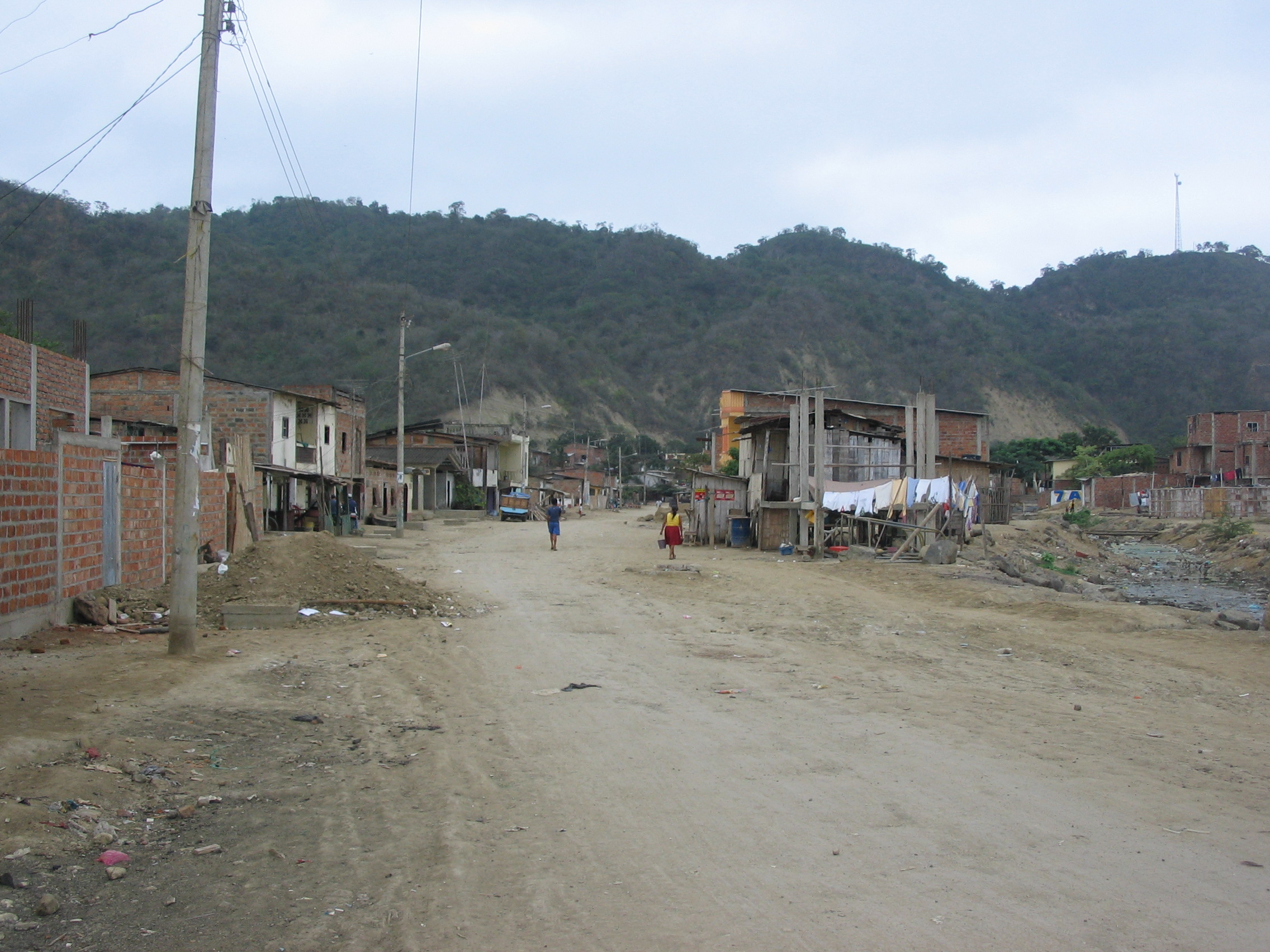 Normal street in Puerto Lopez, Ecuador